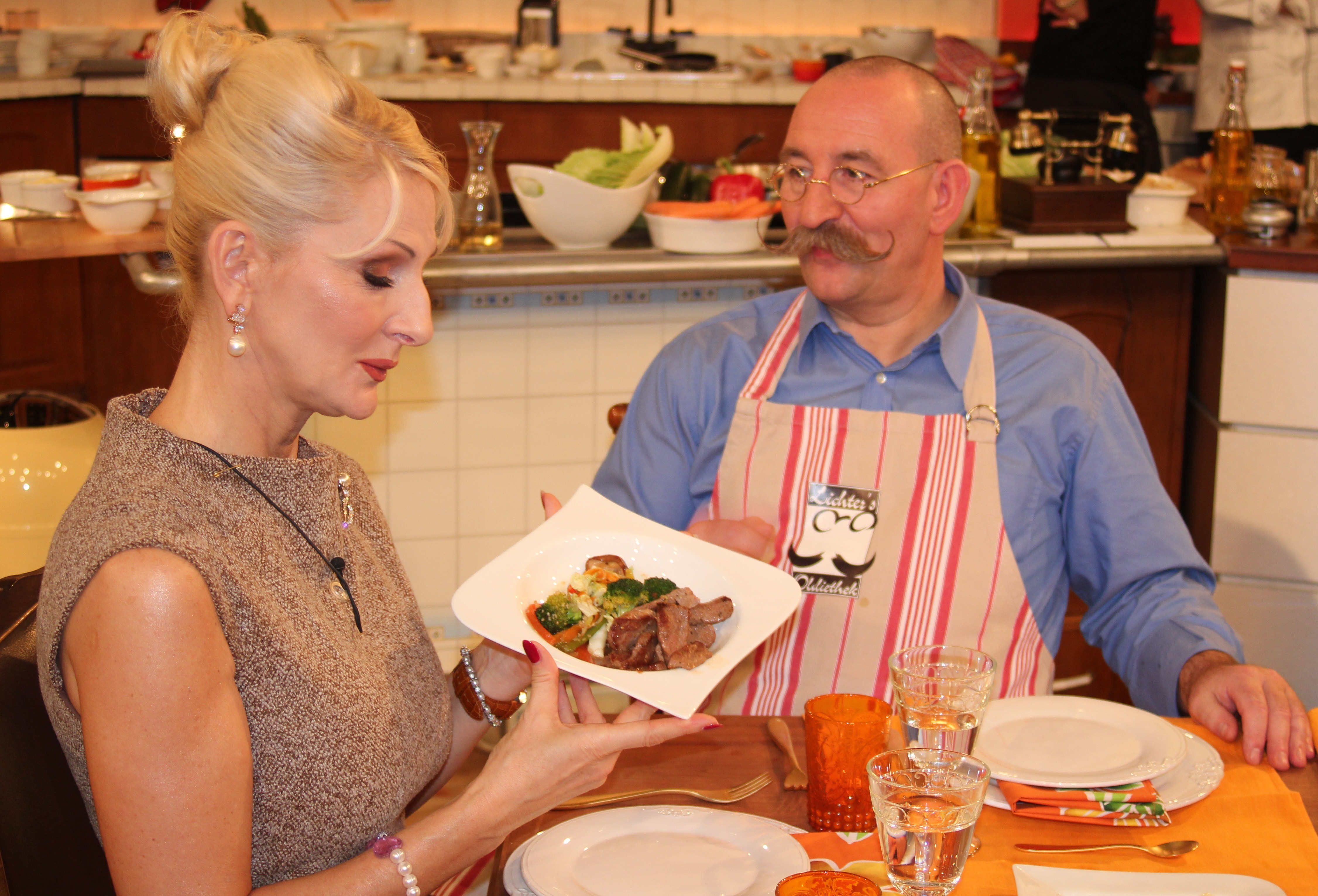 Désirée Nick und Horst Lichter bei der Fernsehaufzeichnung Lafer Lichter Lecker